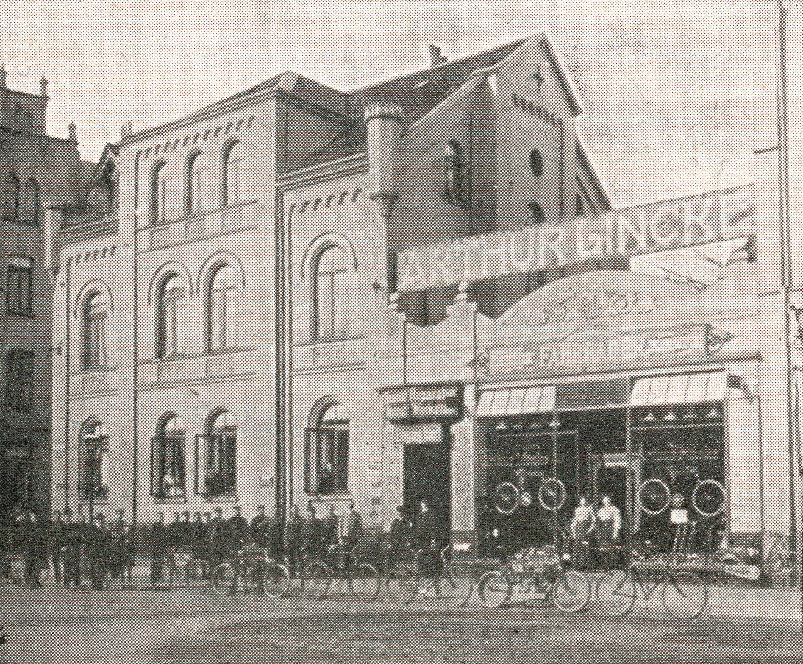 Blick um 1907 auf das ehemalige Gebäude der Kirchengemeinde der Christuskirche und nunmehrige Fahrräder-, Nähmaschinen- und Motorfahrzeuge- Grosso-Haus von Arthur Lincke in der Nordstadt von Hannover, Engelbosteler Damm Ecke Oberstraße ...